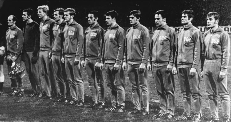 Zentralbild-Kluge-12.11.70-ma-Dresden: Fußball-Europameisterschaftsspiel der Vorrundengruppe 7 am 11.11.1970 unter Flutlicht im ausverkauften Dresdner Rudolf-Harbig-Stadion. DDR besiegt Niederlande 1:0. Die DDR-Nationalmannschaft vor Spielbeginn v.l.n.r.: Mannschaftskapitän Otto Fräßdorf, Torwart Jürgen Croy, Klaus Sammer, Frank Gansera, Hans-Jürgen Kreische, Michael Strempel, Eberhard Vogel, Lothar Kurbjuweit, Henning Frenzel, Peter Ducke und Peter Rock.